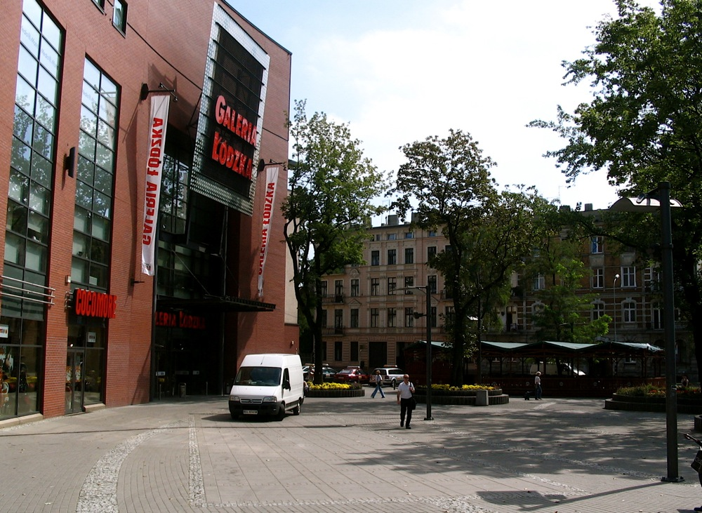 Wejście do Galeria Łódzka|Galerii Łódzkiej od strony ulicy Henryka Sienkiewicza w Łodzi